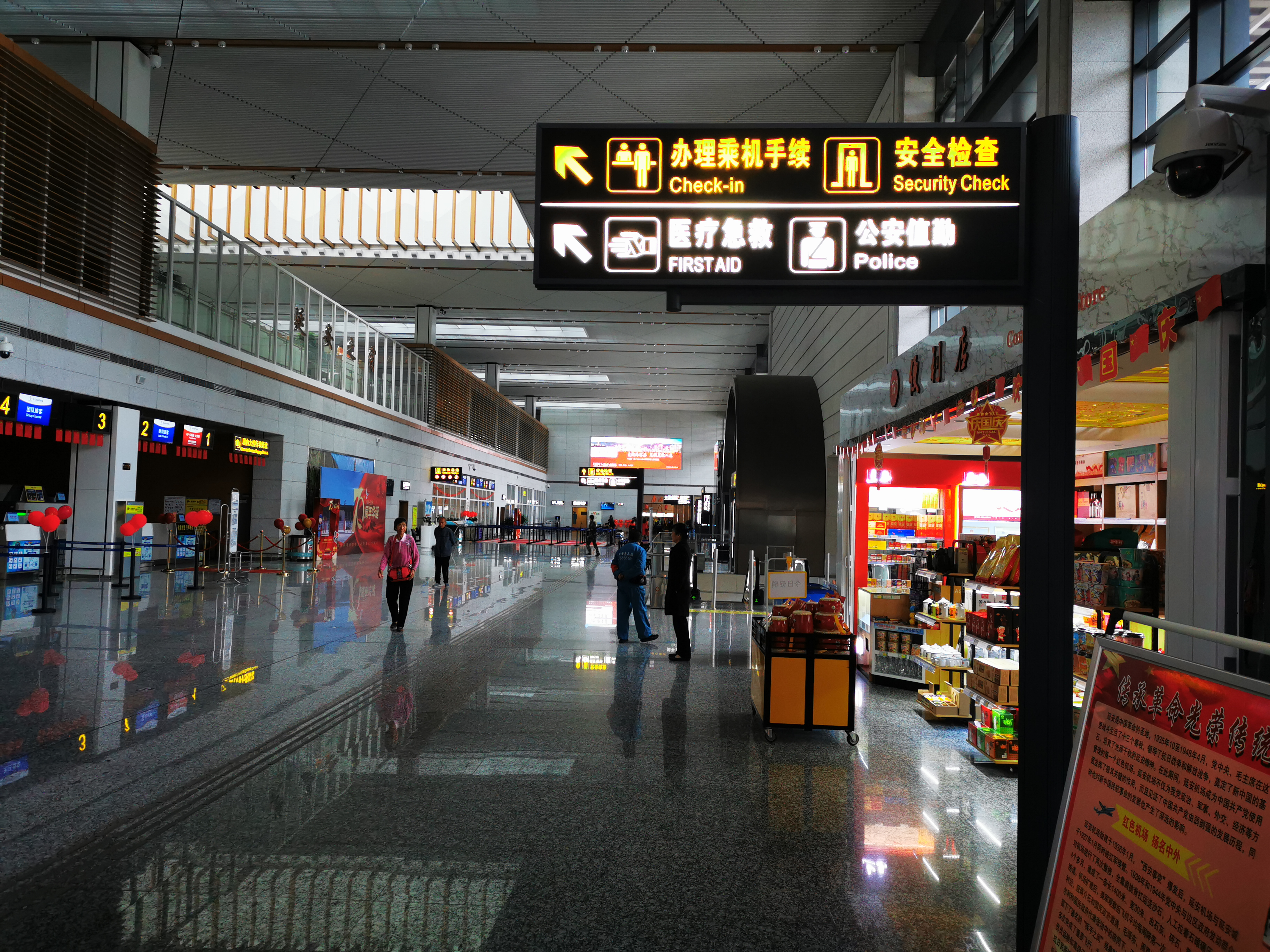 延安市宝塔区延安南泥湾机场航站楼内